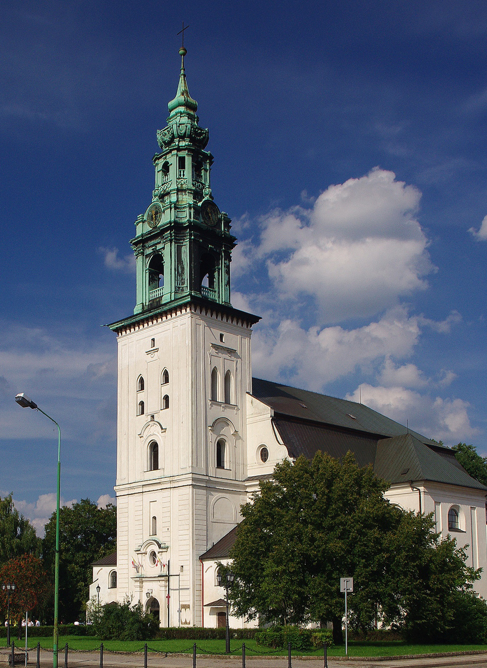 Krosno Odrzańskie - dawny kościół ewangelicki, obecnie rzymskokatolicki parafialny p.w. św. Jadwigi, (XV), 1708-1729, XIX